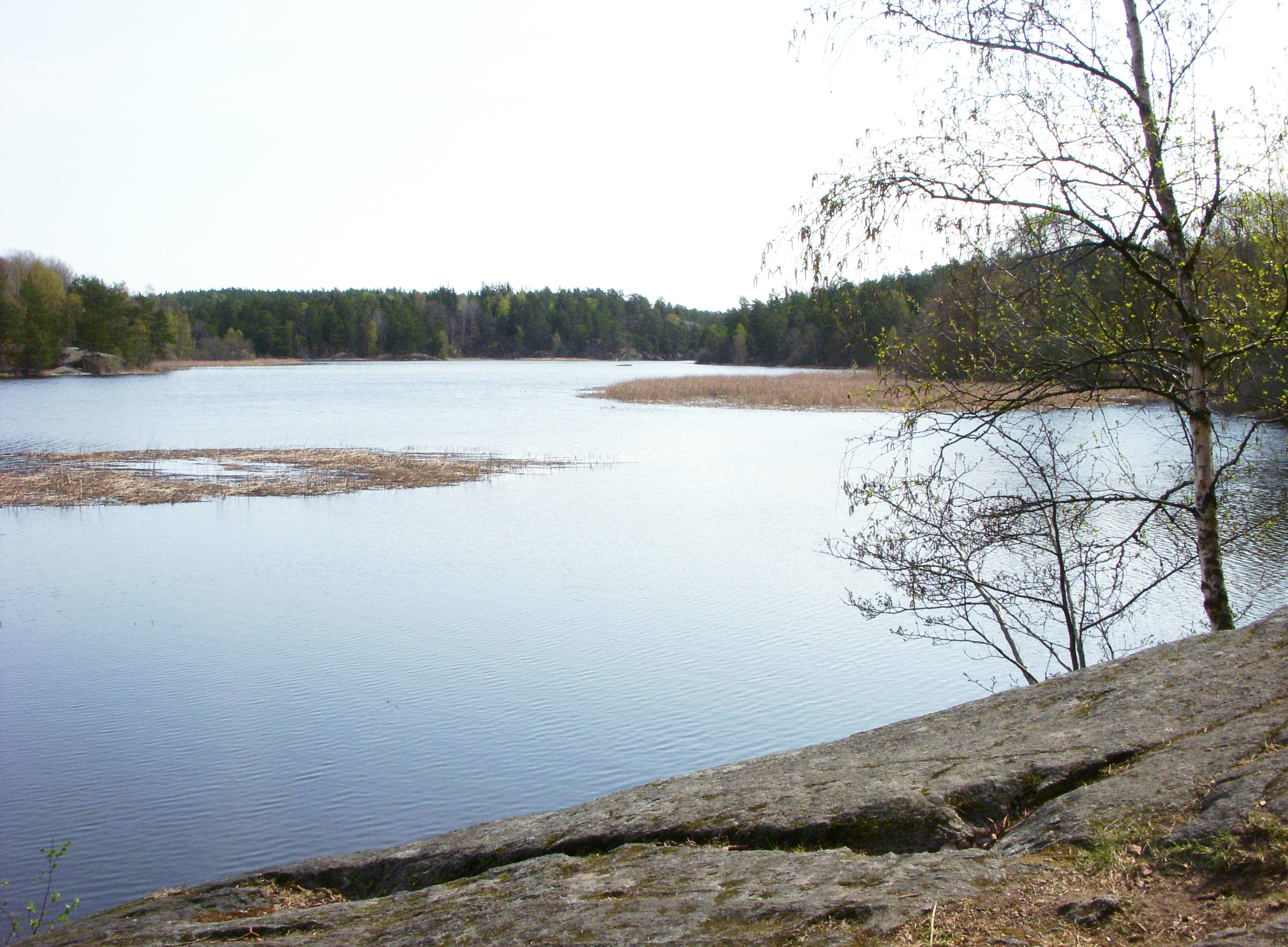 Dammtorpssjön i Nacka